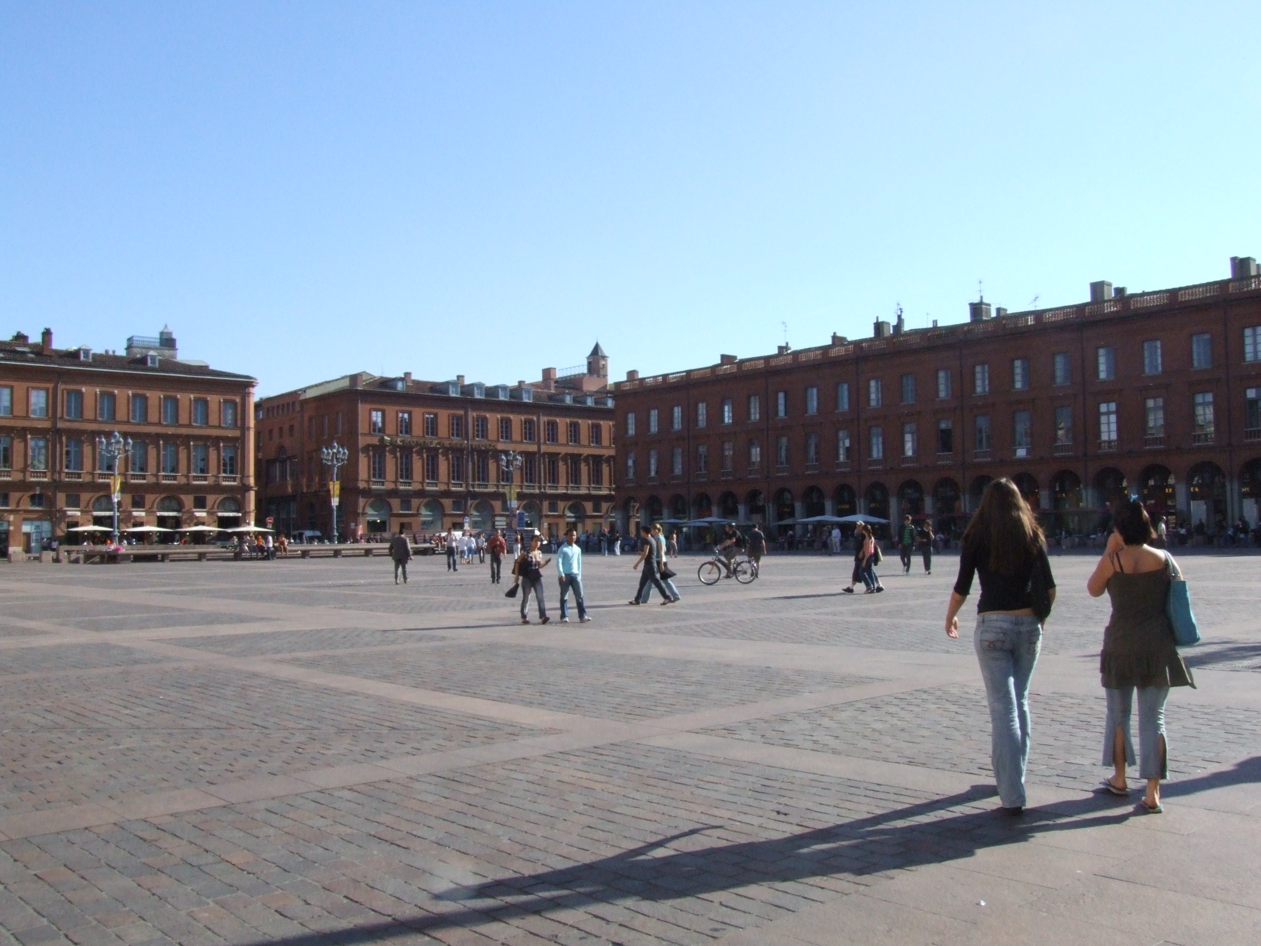 La place du Capitole de Toulouse. Vue depuis le coin Rémusat sur le coin Saint-Rome et Gambetta.